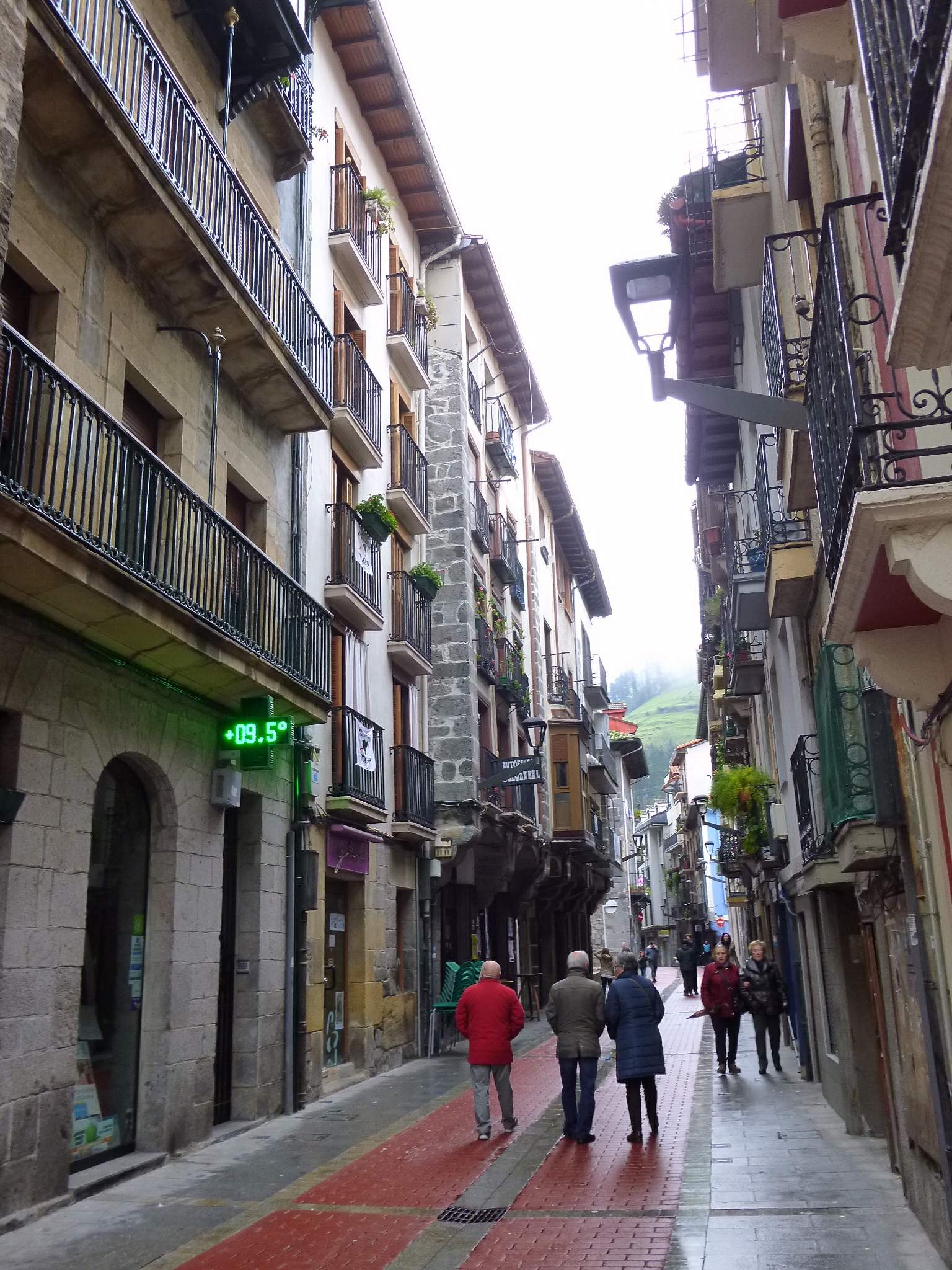 Soraluze (Gipúzkoa)